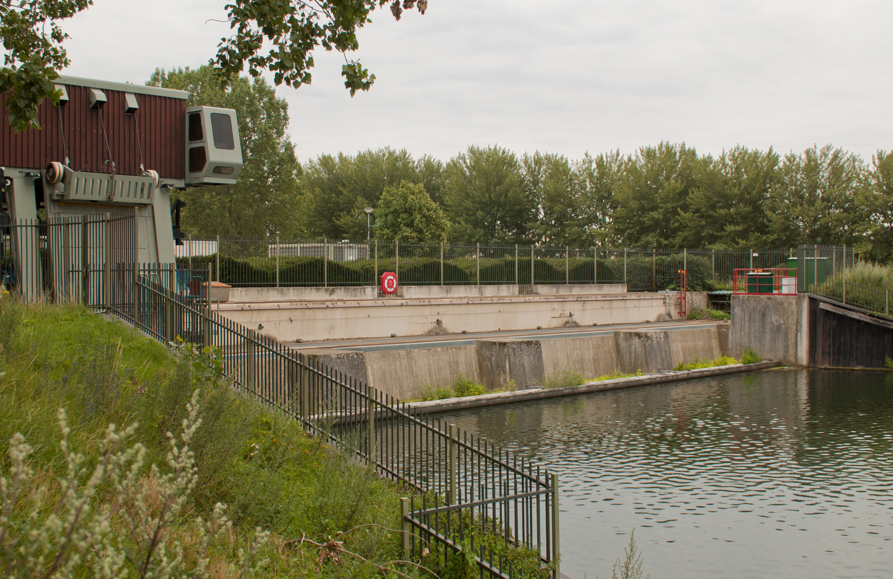 Das Wasserkraftwerk des Essent-Konzerns in der Maas bei Linne, Niederlande. Vier Meter Fallhöhe, vier Kaplan-Turbinen, Jahresleistung 35 Millionen Kilowattstunden, Baujahr 1987 - 1989. Aufnahme von der Stauseite aus.